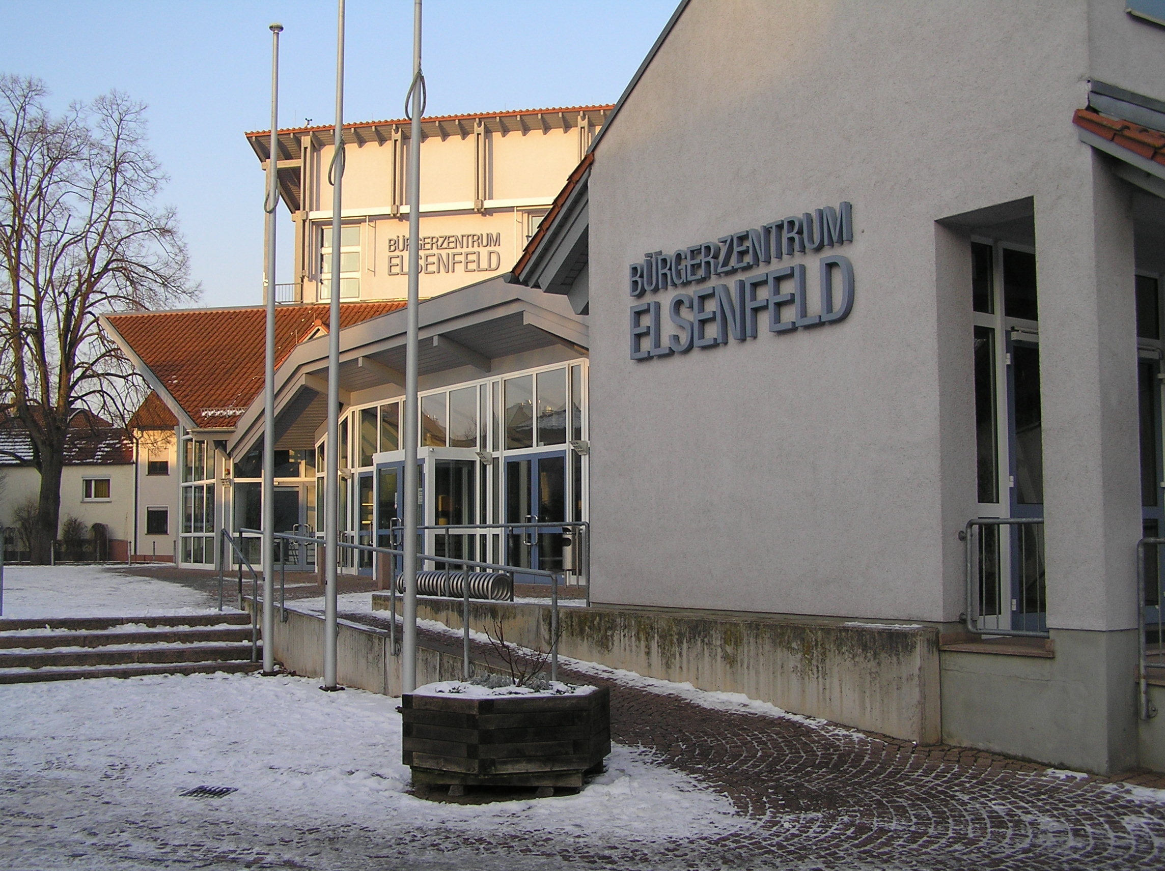 Das Elsenfelder Bürgerzentrum